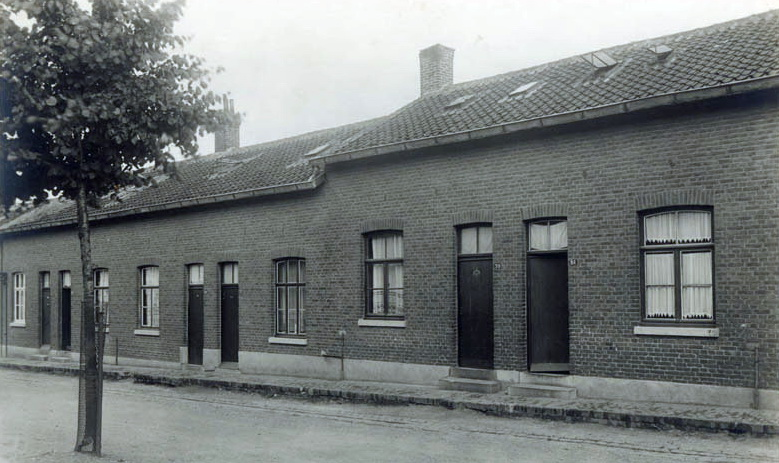 Arbeidershuizen aan de Statensingel in Maastricht in 1920-1925. De huizen zijn in de jaren 1970/80 vergroot met een verdieping. Fotocollectie RHCL Maastricht, GAM 11157.